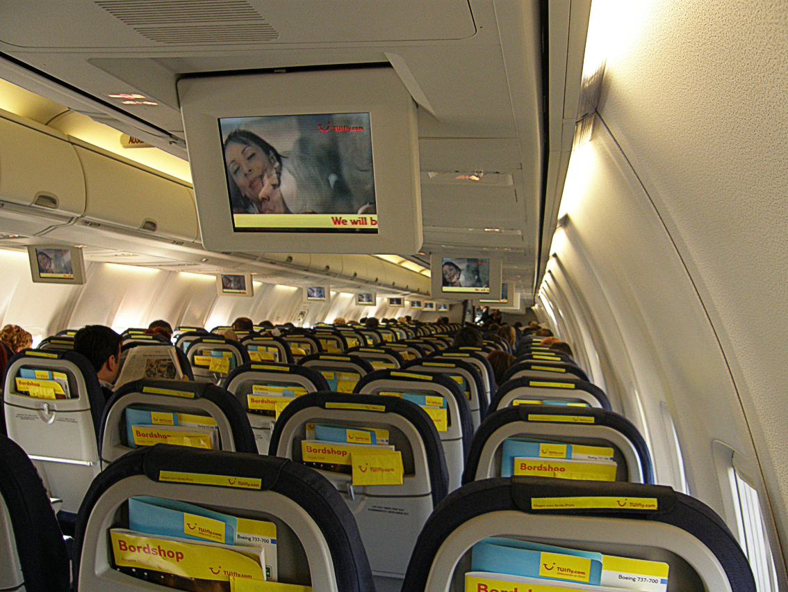 Im einem Flugzeug der TUIFly